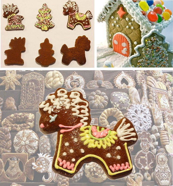 Zdobione pierniki archangielskie i podobne